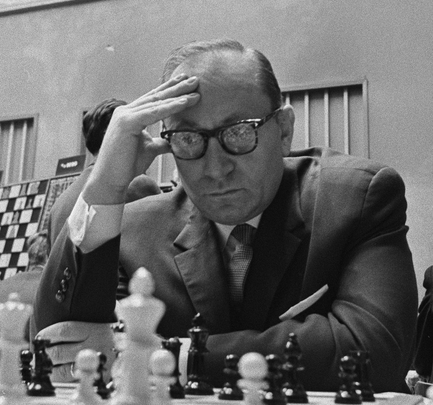 László Szabó (Beverwijk)